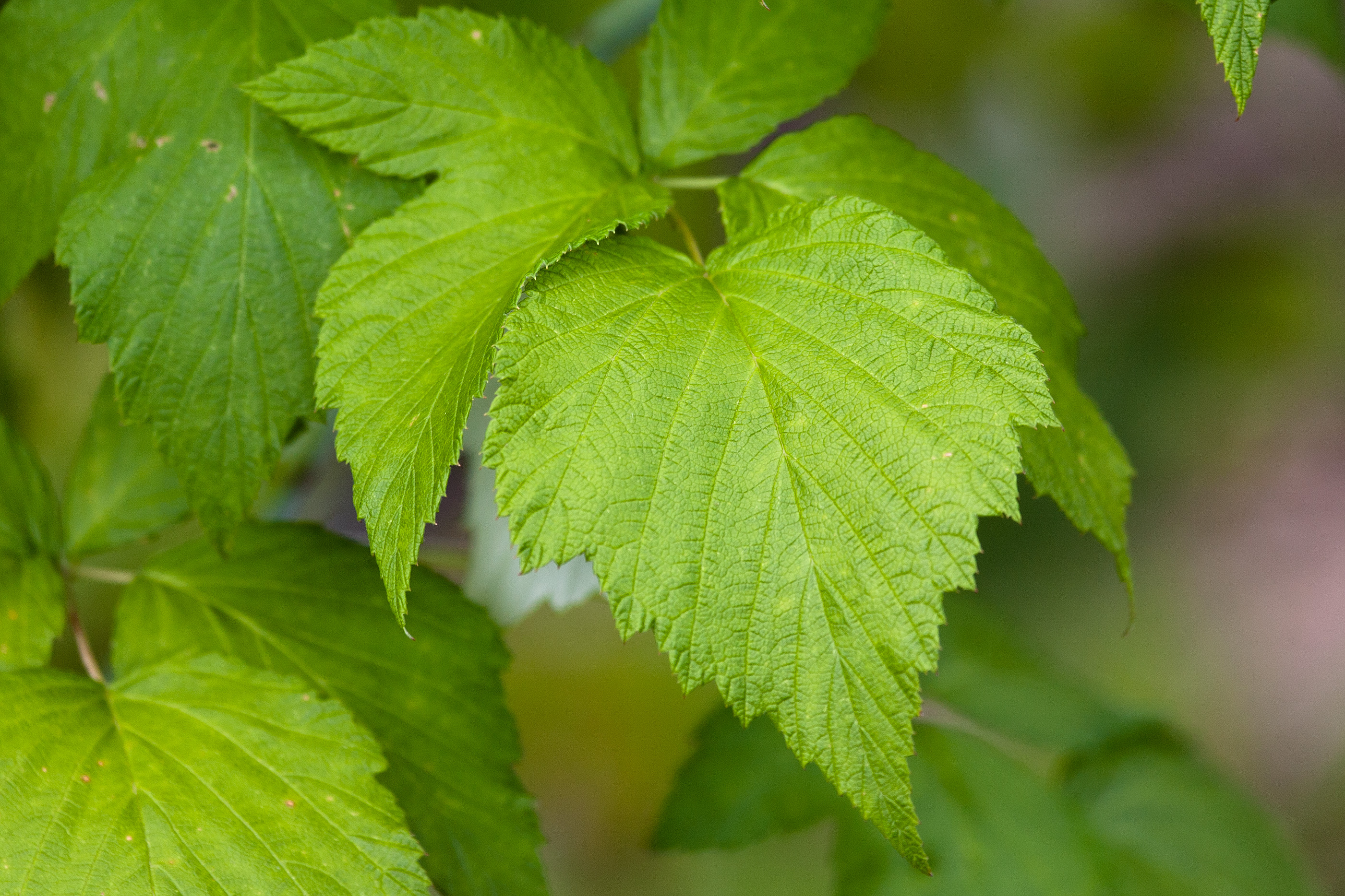 Rubus × loganobaccus Blatt